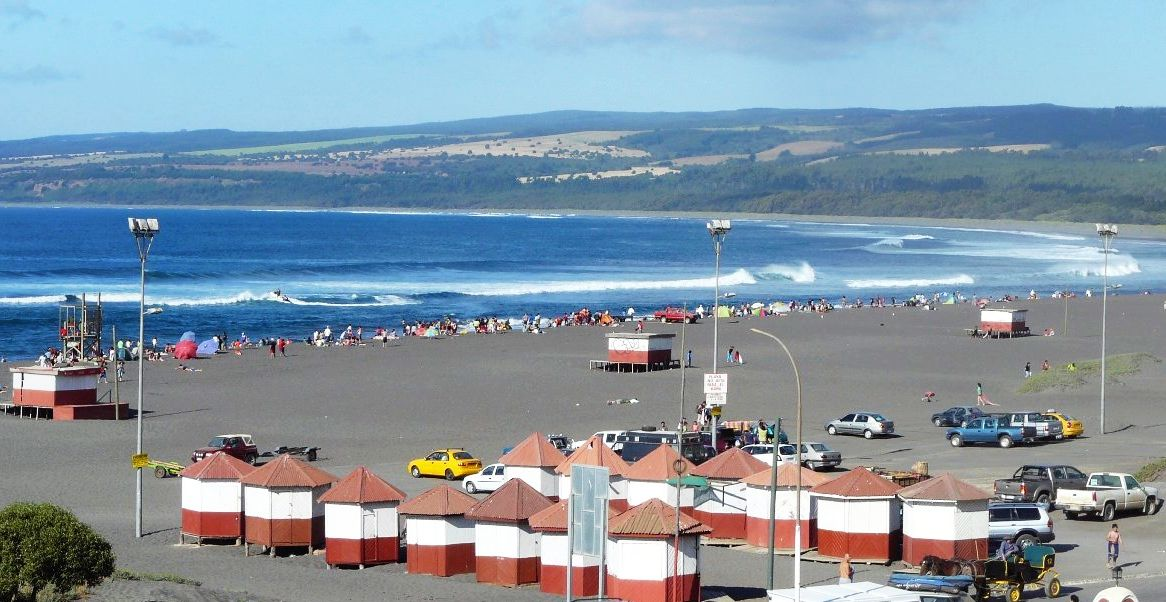 panoramica de la playa de pichilemu